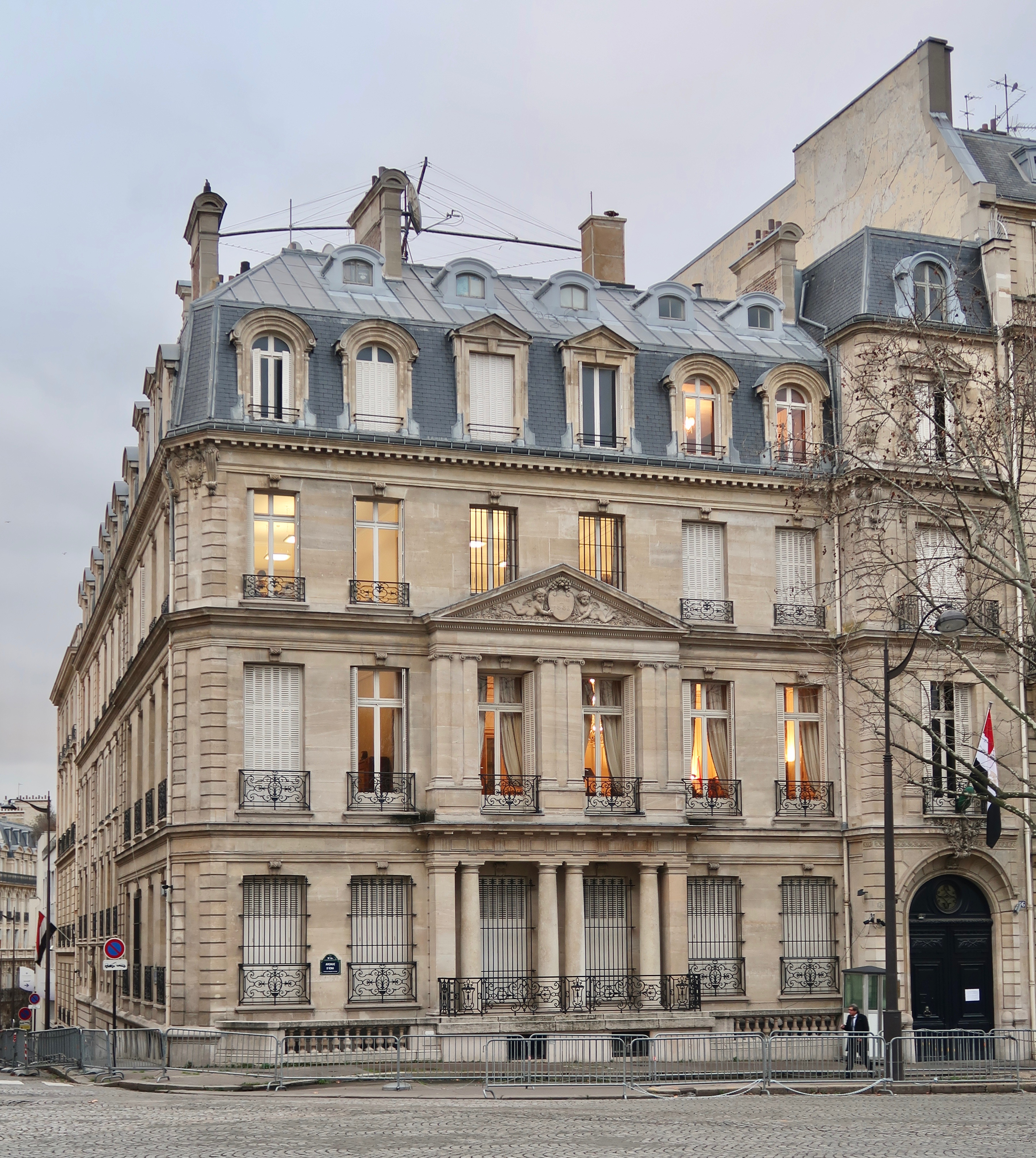 Ambassade d'Égypte en France, 56 avenue d'Iéna (Paris, 16e).